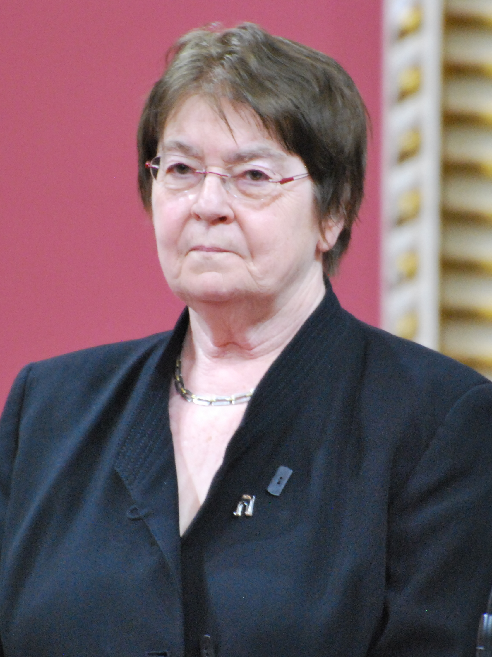 Cérémonie de remise de l'ordre national du Québec 2013. Nicole Brossard